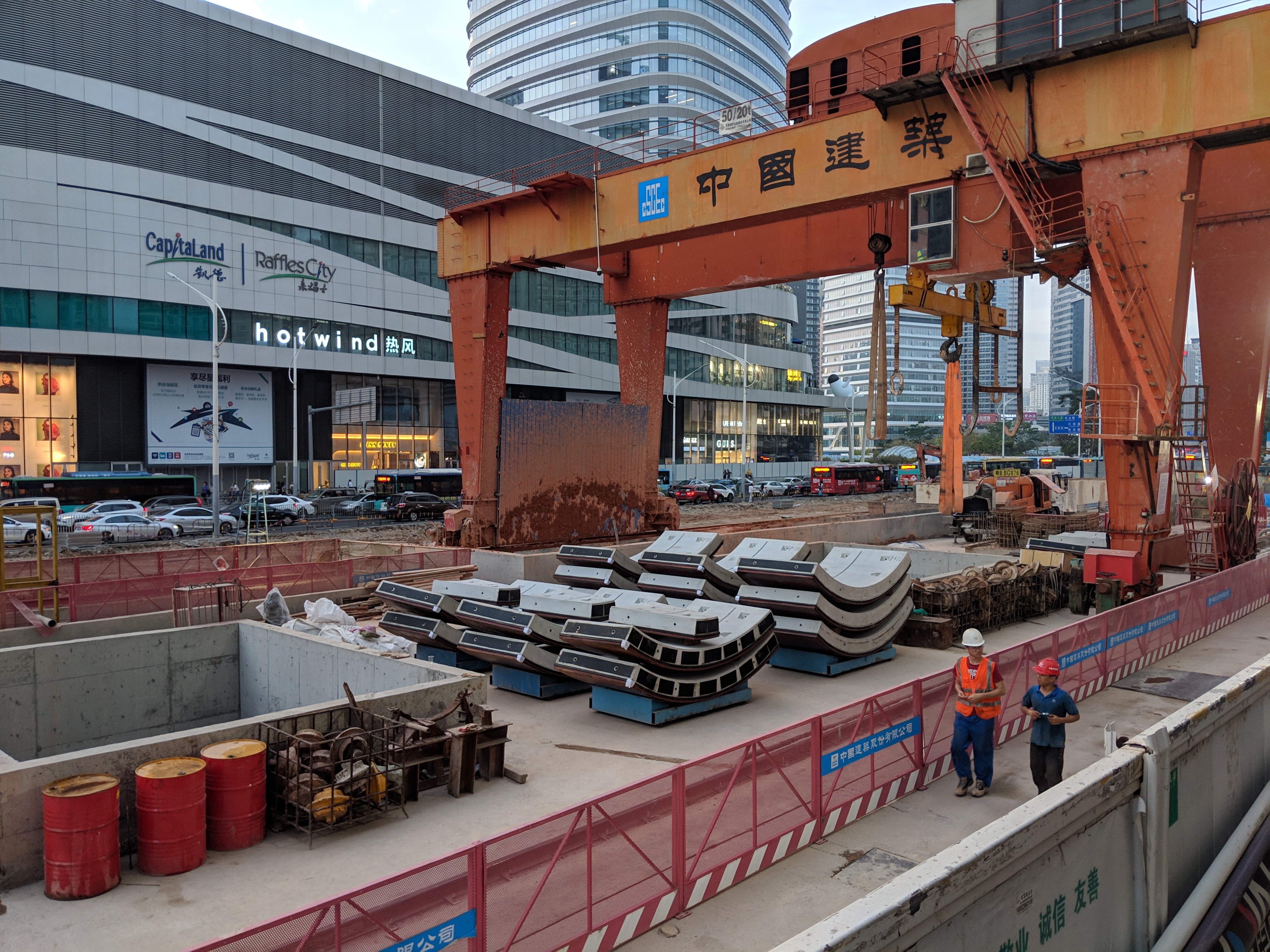 2018年11月，深圳地铁9号线延长线南油站施工现场。